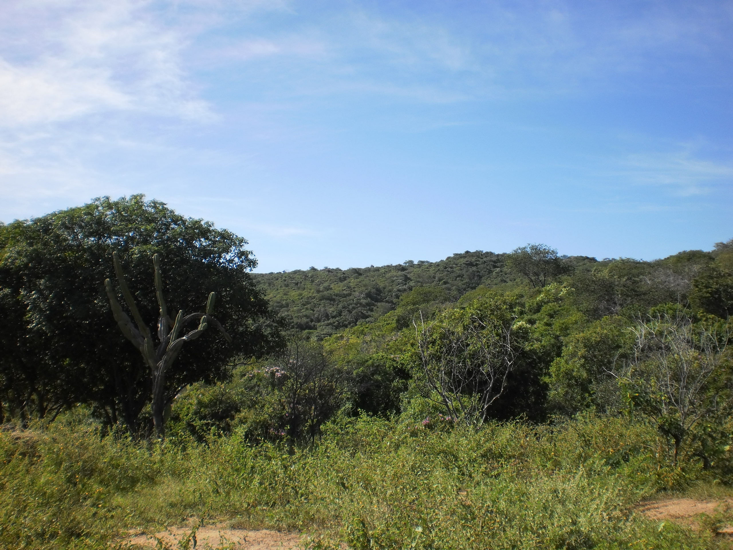 Vegetação da caatinga hiperxerófila e floresta caducifólia na Serra do Lima durante o período chuvoso. Patu - Rio Grande do Norte, Brasil.